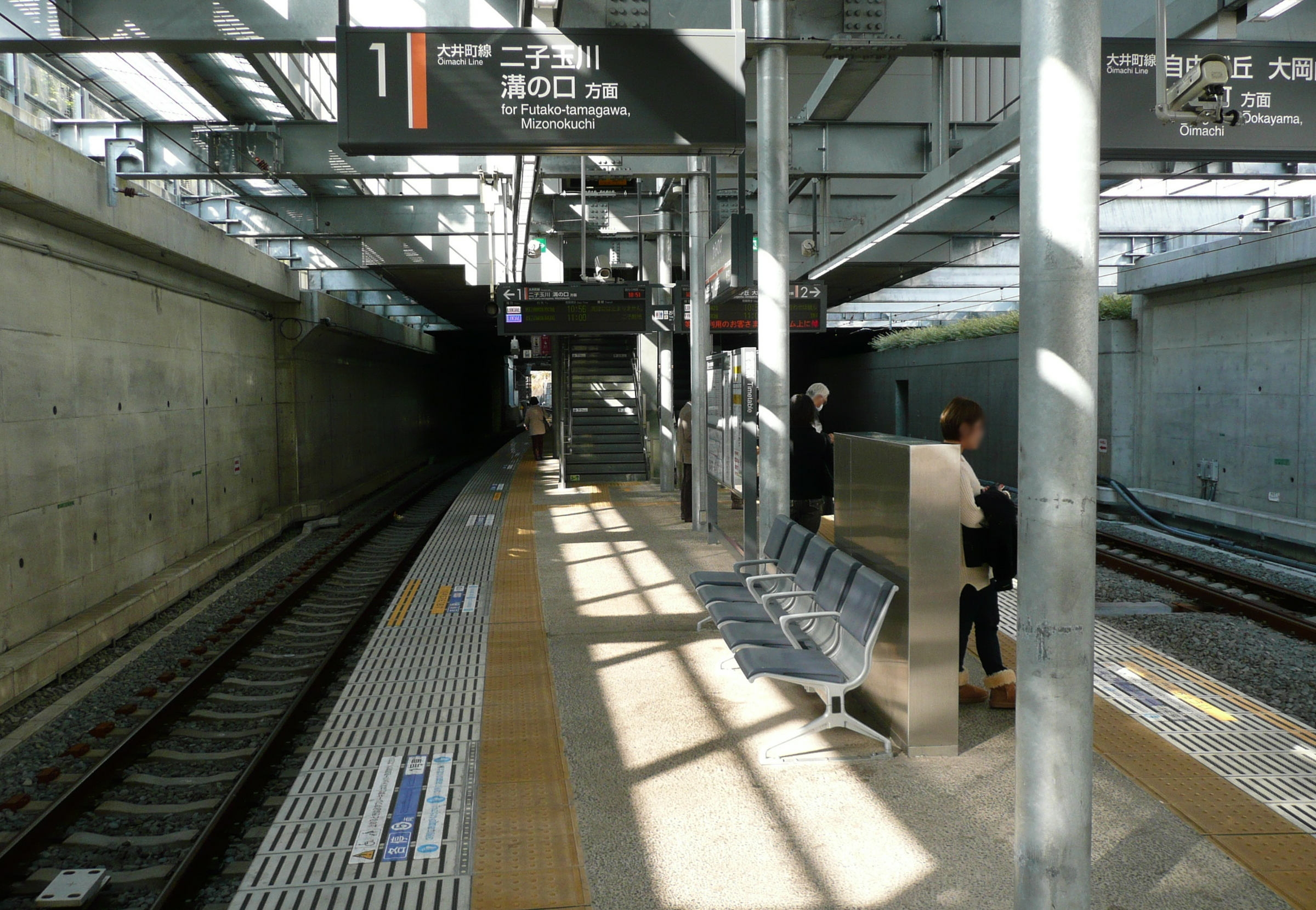 上野毛駅ホーム